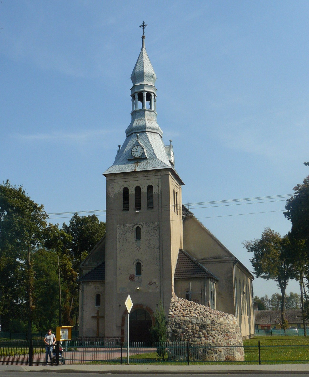 Kościół - Boruja Kościelna.